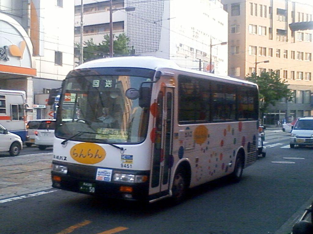 長崎自動車 9451号（長崎200あ・・50、日野 PB-RX6JFAA） - 長崎市新地町にて